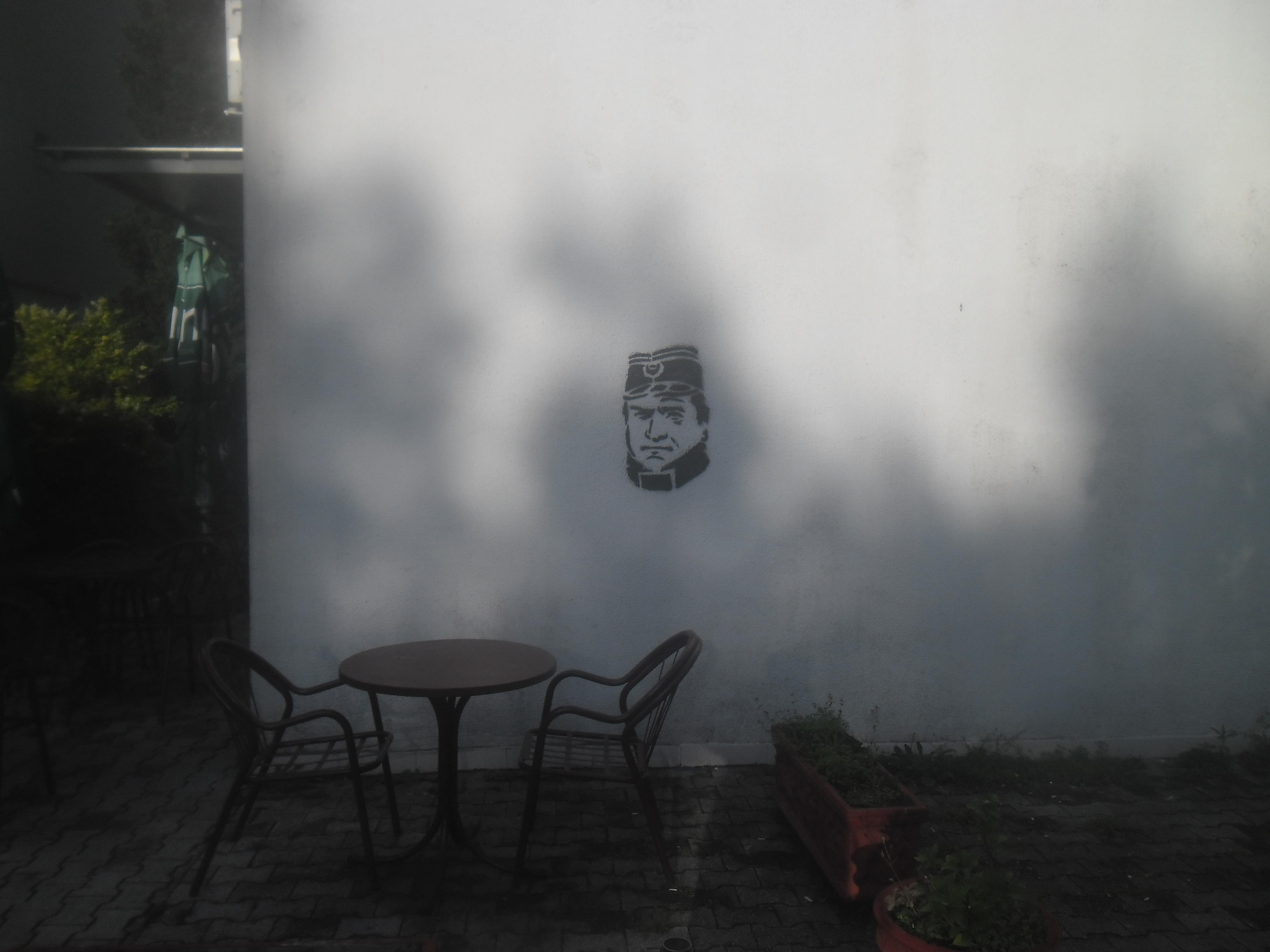 Bar, Crna Gora